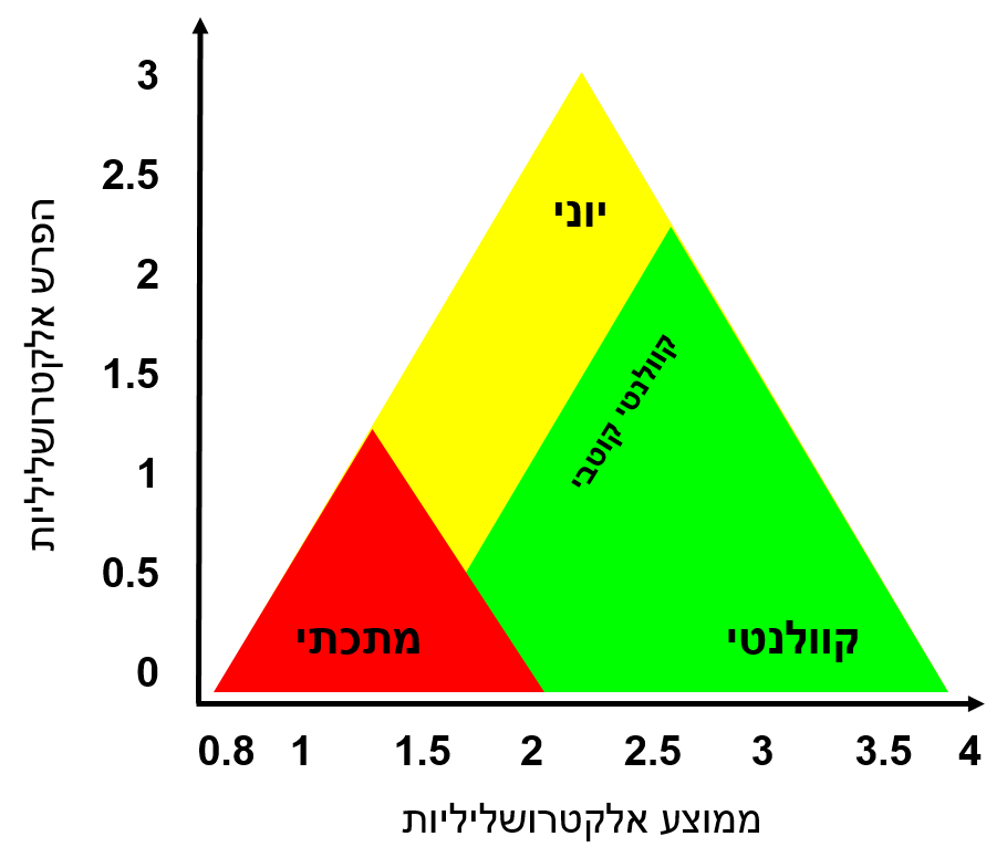 משולש קטלאר